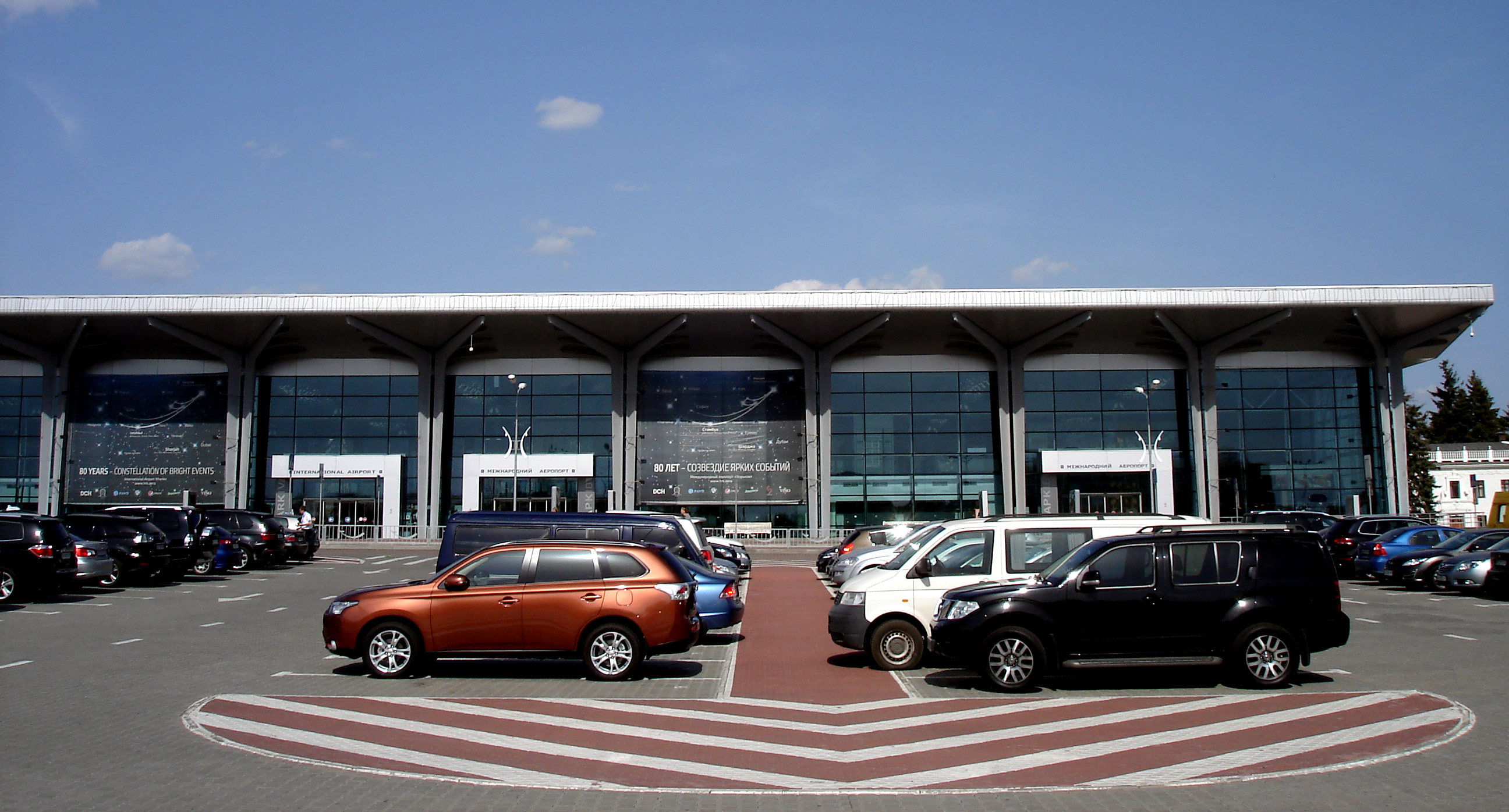 Міжнародний аеропорт «Харків». Пасажирський термінал.